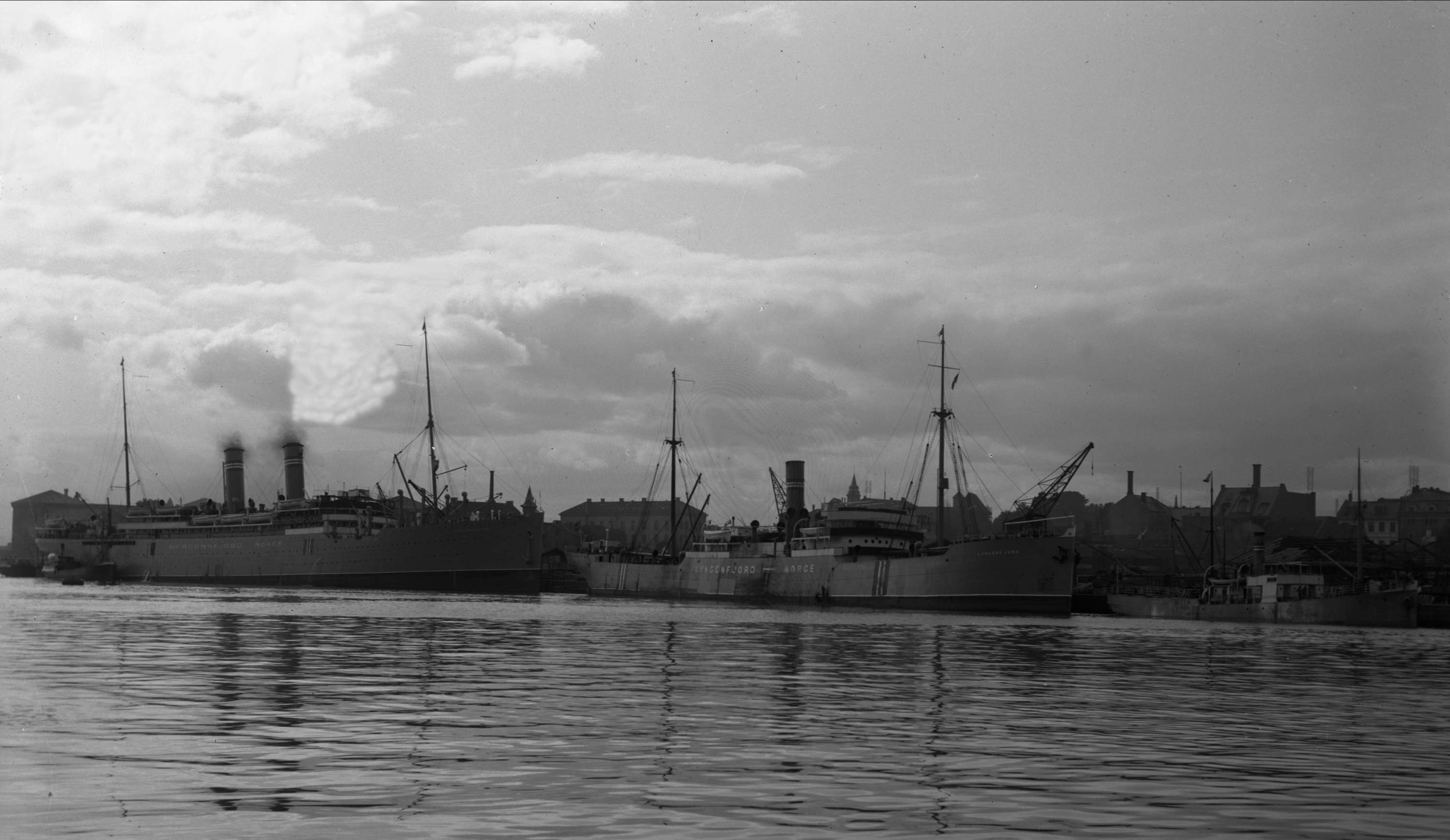 Skip ved kaia, Bergensfjord og Lyngenfjord.